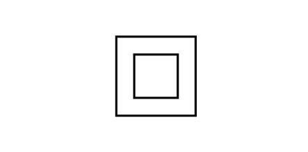 Simbolo che identifica la modalità di protezione a doppio isolamento